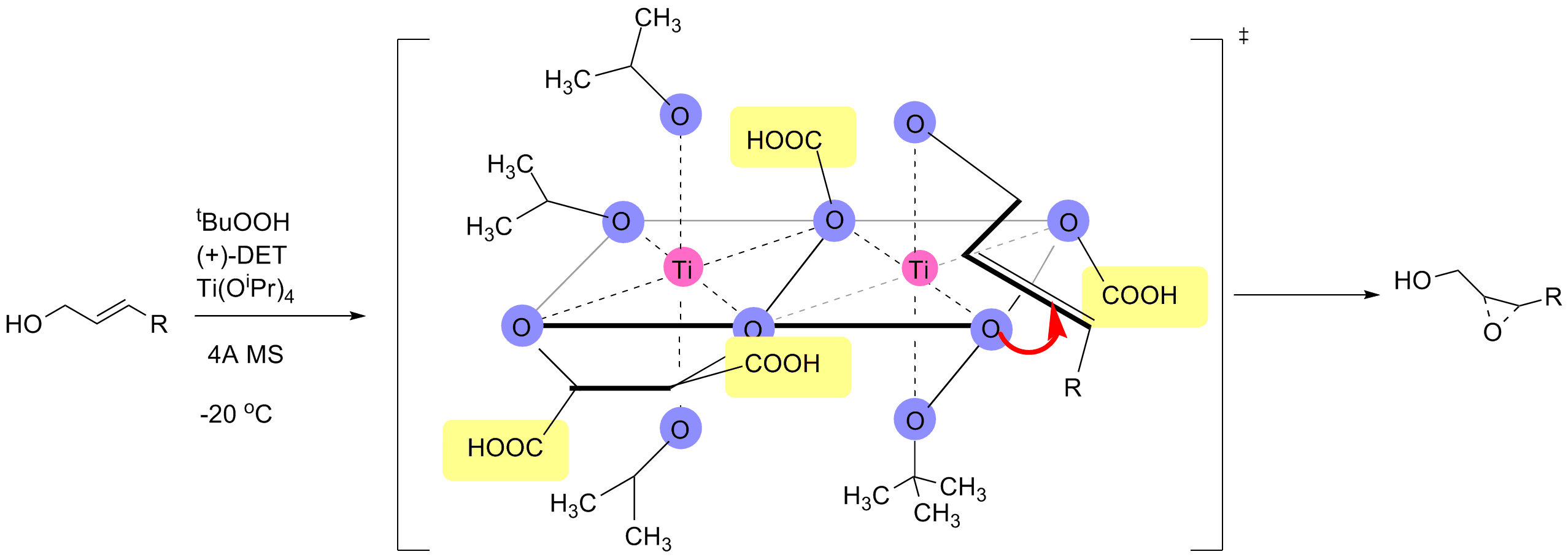 Sharpless不對稱環氧化反應機理。